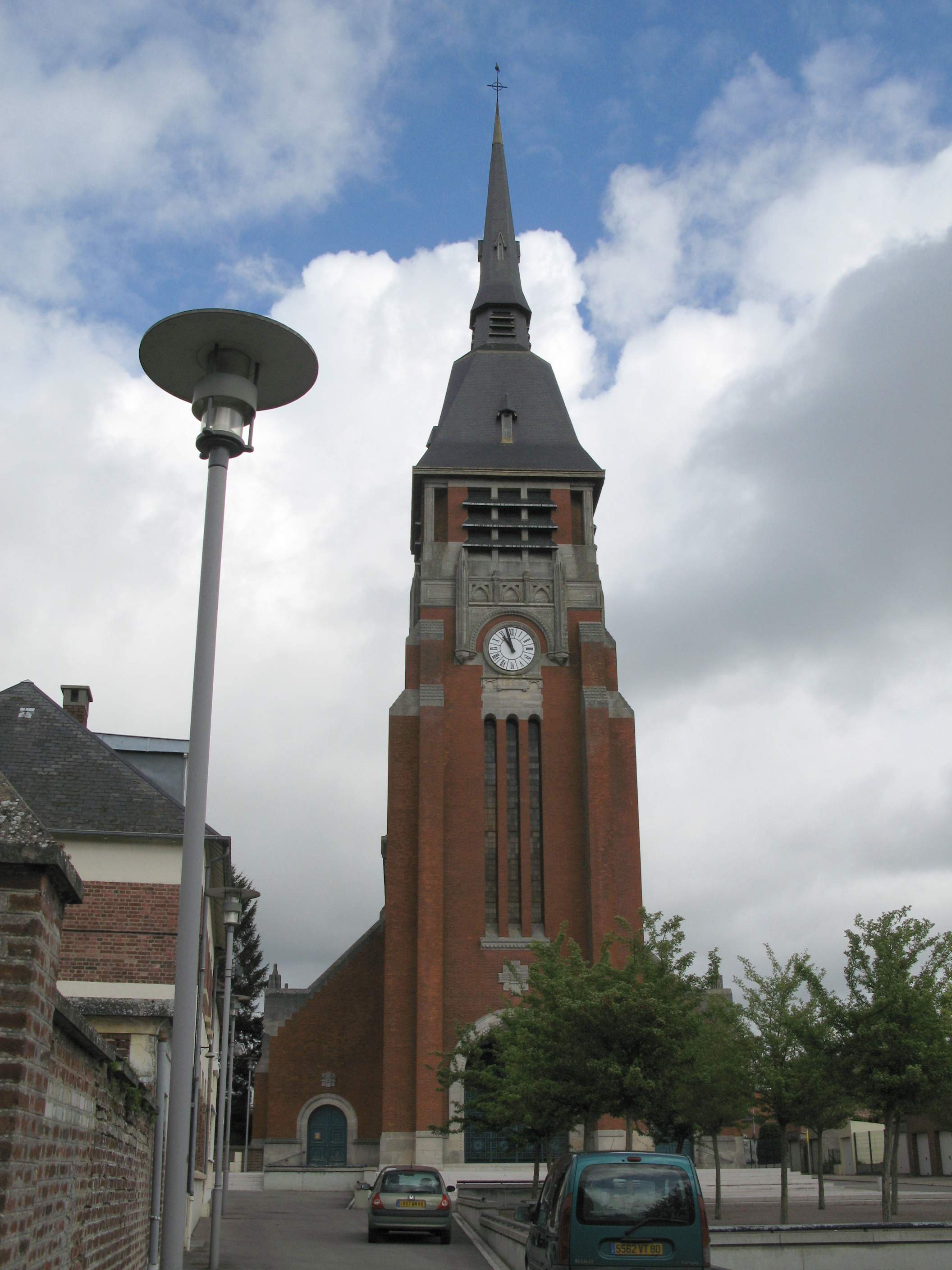 Villers-Bretonneux (Somme, France) - L'église. . .